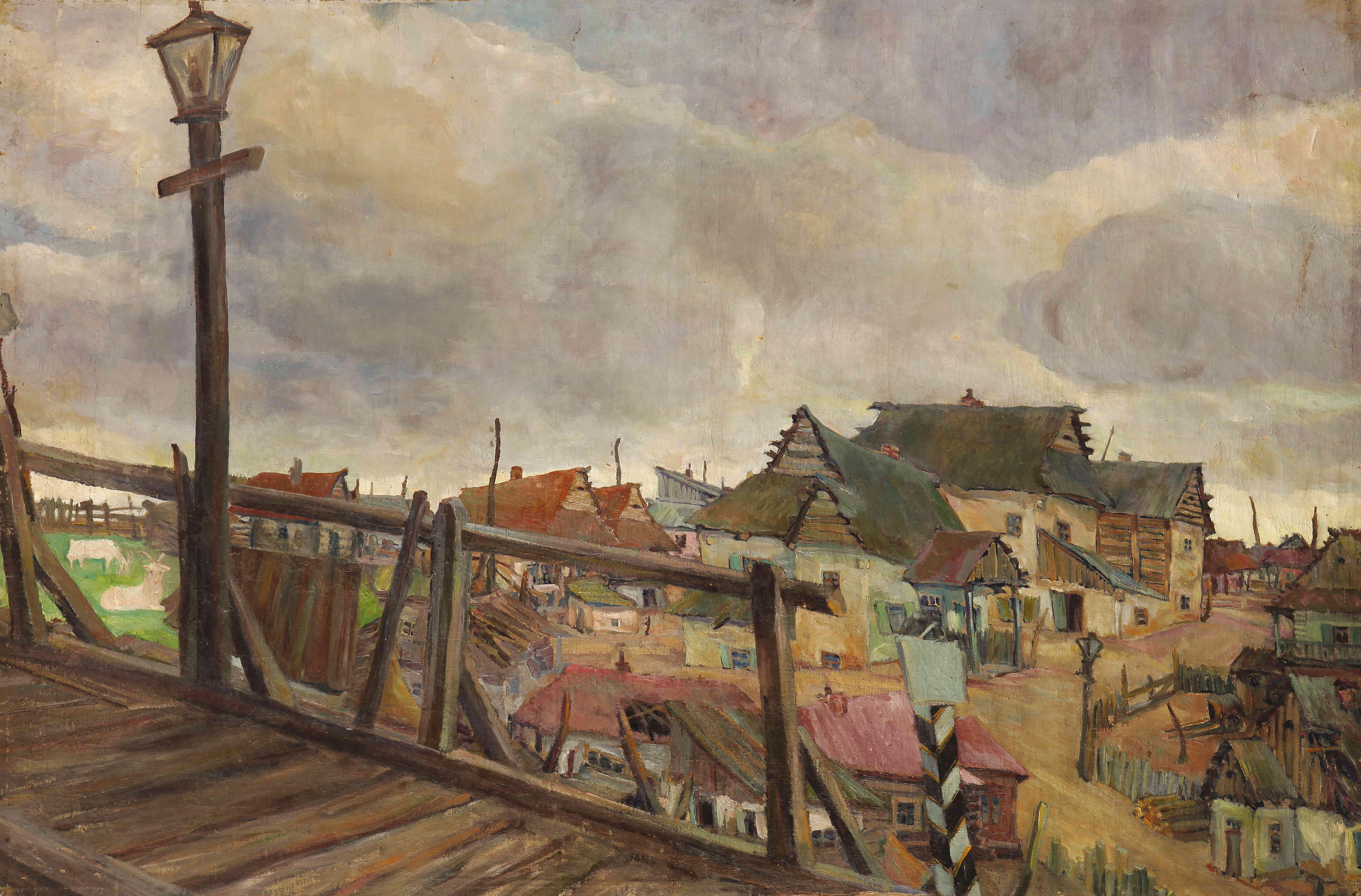 Стары Віцебск Маневіч Абрам, 1920-я гг. Палатно, алей 125,5×183 см Нацыянальны мастацкі музей Рэспублікі Беларусь